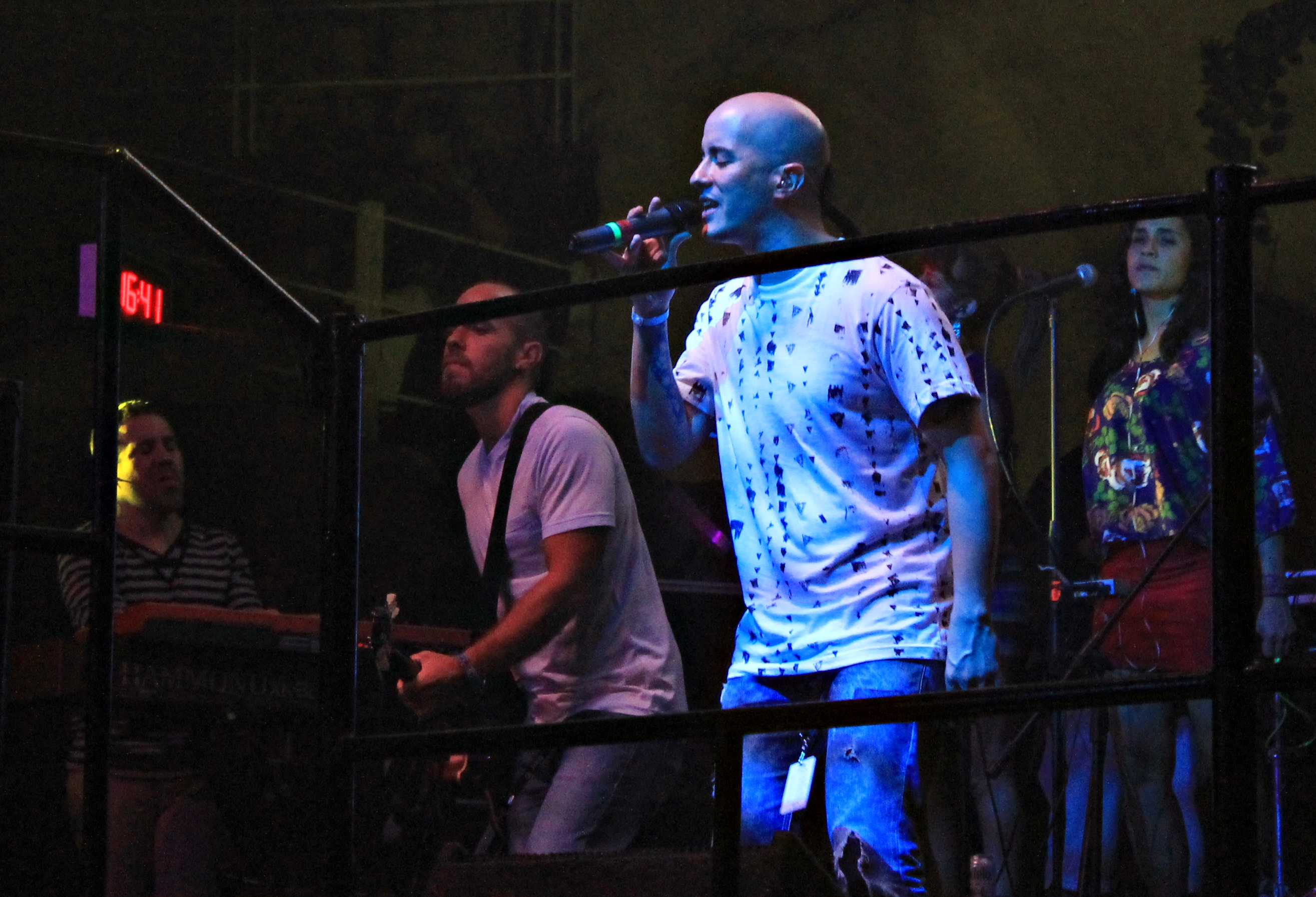 Willy rodriguez Vocalista De Cultura profetica En su Presentacion En Cancun Quintana Roo